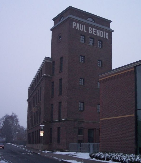 Paul Bendix Dülmen Alte Werkseinfahrt